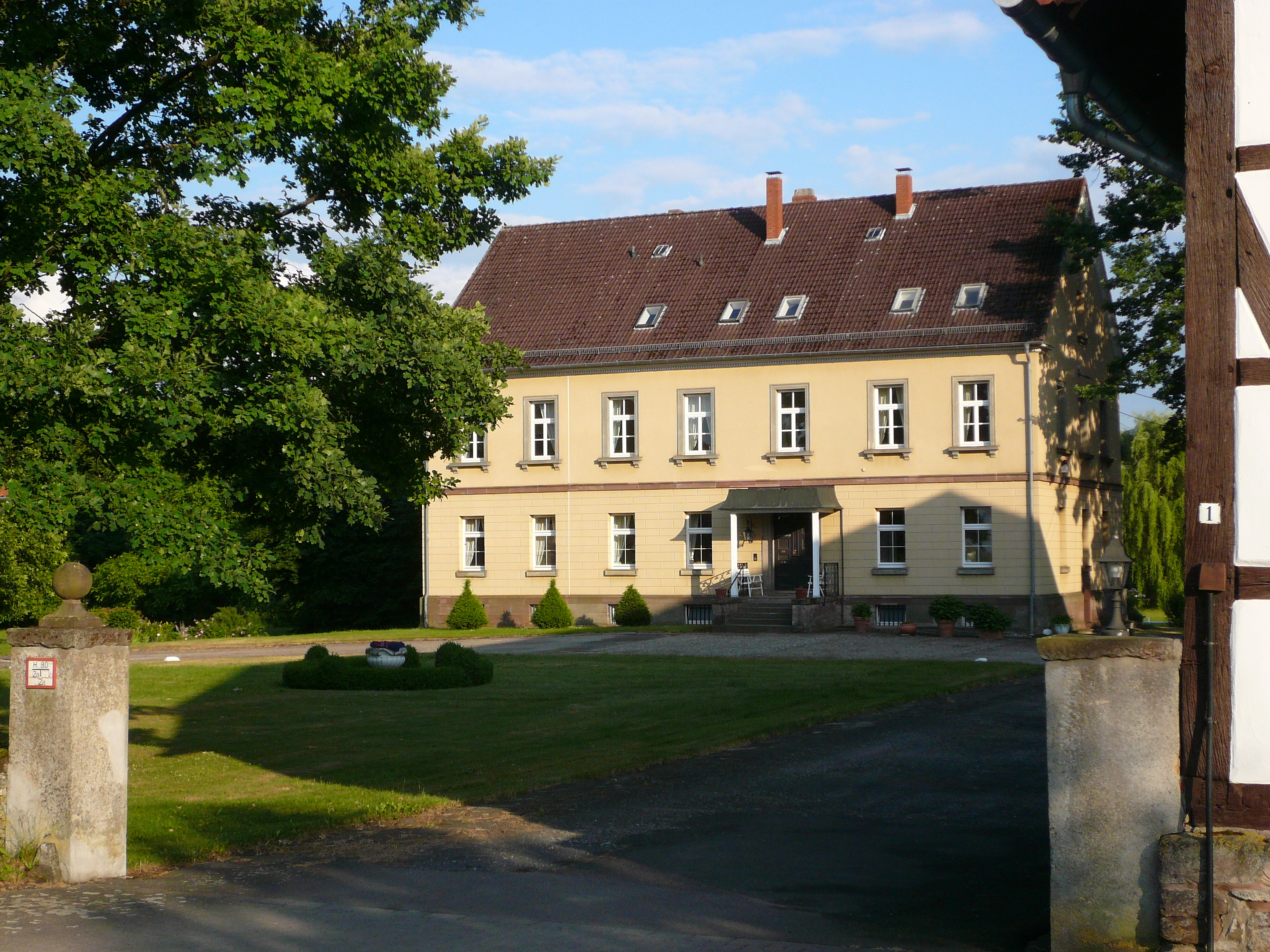 Pächterwohnhaus des Ritterguts Parensen, Flecken Nörten-Hardenberg, Südniedersachsen. Verputzter Kalktuffbau auf Sandsteinquadersockel, Erdgeschoss mit Scheinquaderung. Erbaut 1848, 1921 um zwei Achsen erweitert (Baudenkmale in Niedersachsen, Bd. 7.1, S. 200)